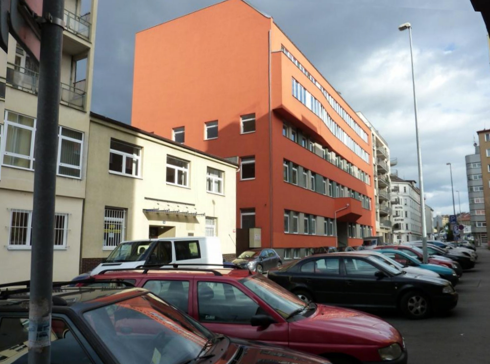 Současný stav sídla ÚVMV v Lihovarské 12. Původní budova (oranžová) byla dvoupatrová.